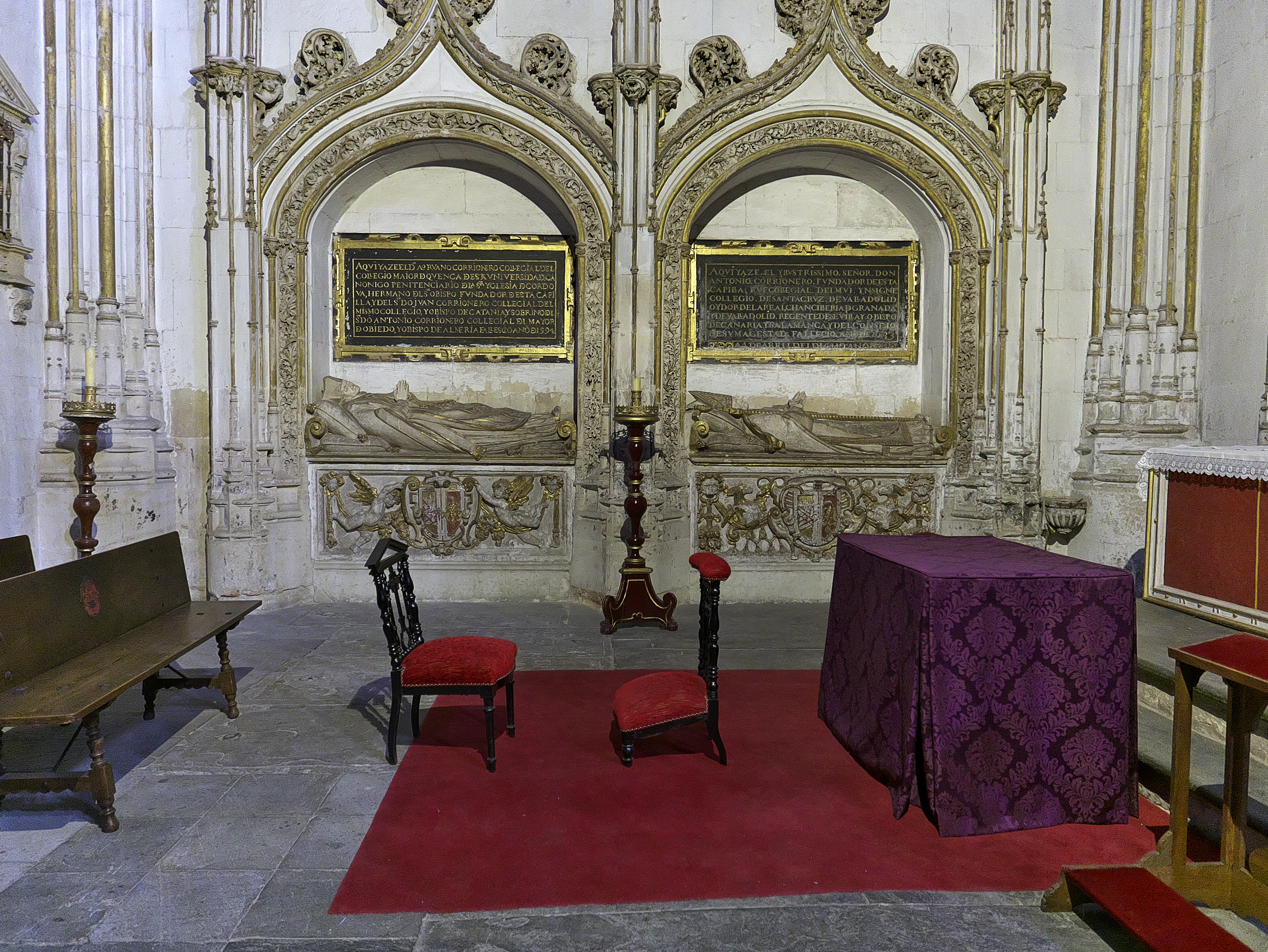 Capilla fundada en 1628 por Ilmo. Sr. D. Antonio Corrionero, obispo de Canarias y sus islas, natural de Babilafuente. Sepulcros de Alonso Ruano Corrionero (†1594) y de Antonio Corrionero (†1633)